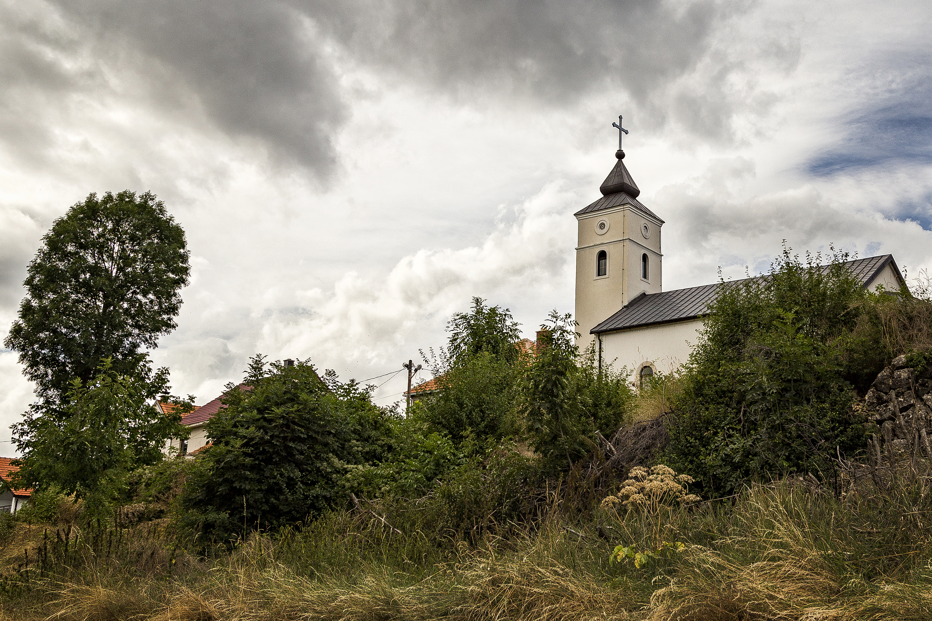 Храм Светог Василија Острошког у Автовцу саграђен је и освећен 1907.